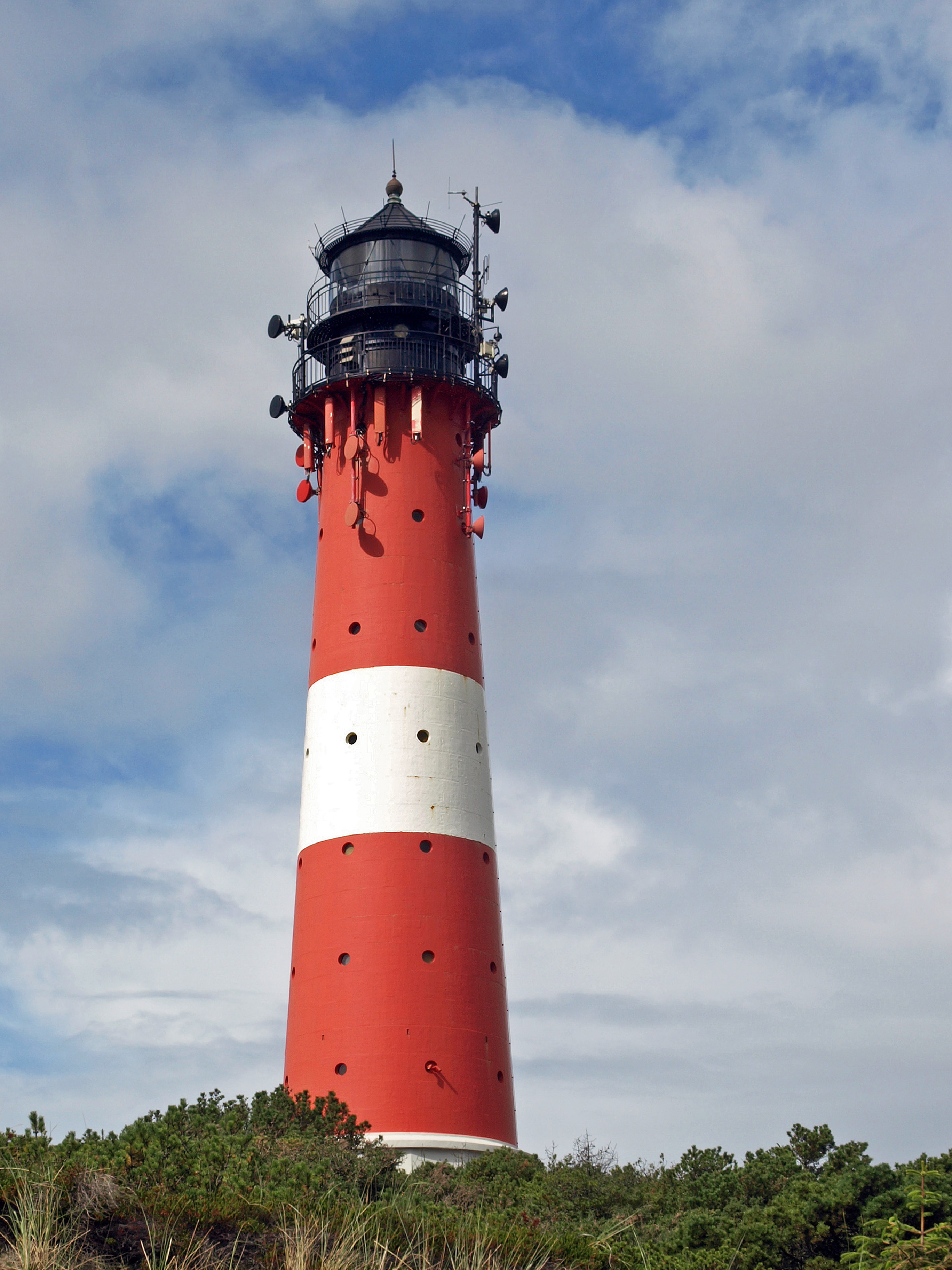 Leuchtturm in Hörnum, in Betrieb seit 1907